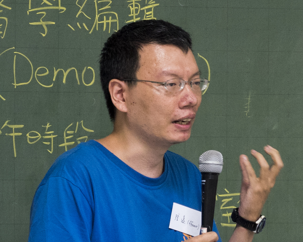 Wikimedia Taiwan 10 Anniversary Conference Lighting Talk